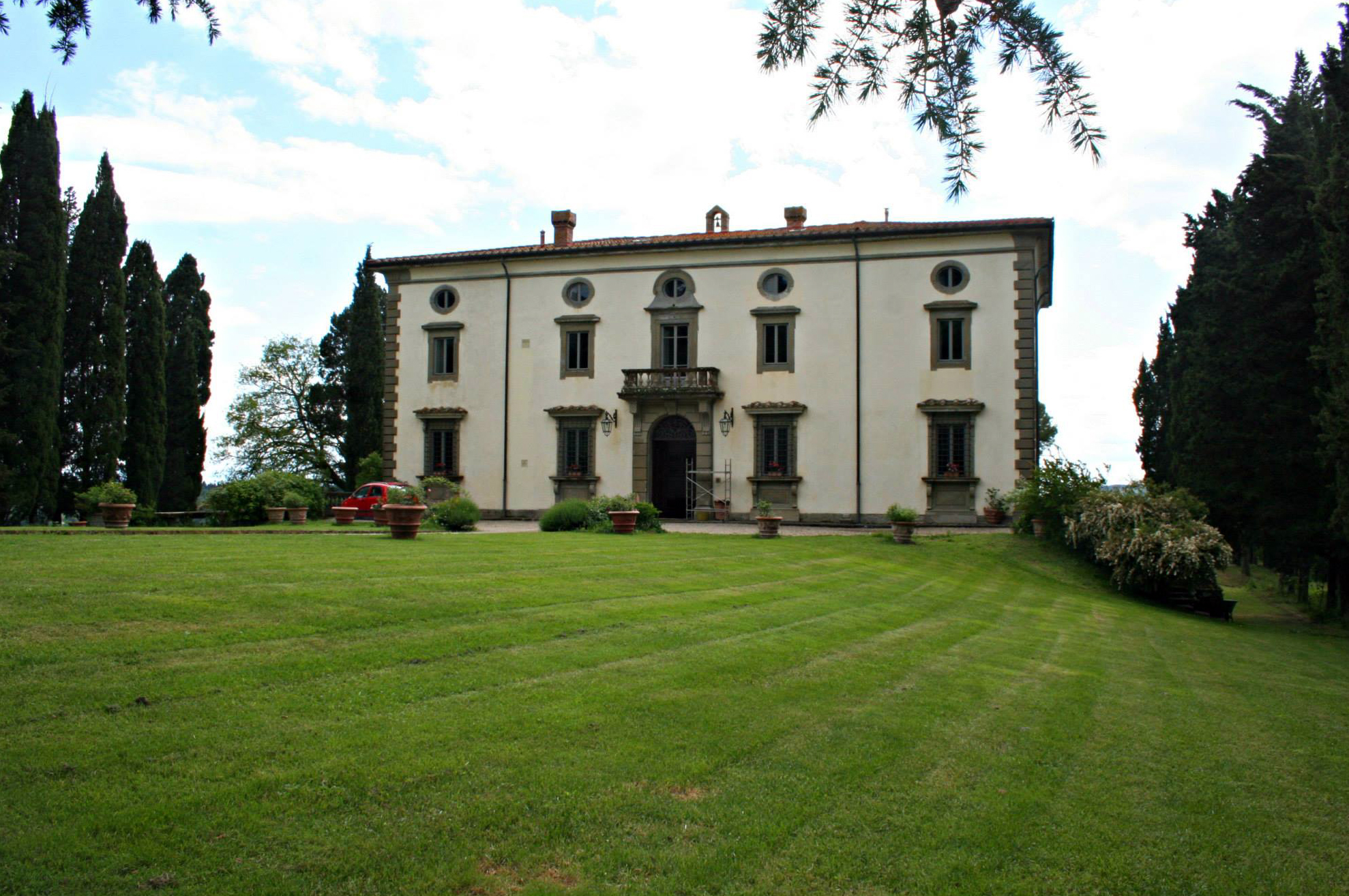 Villa di bivigliano